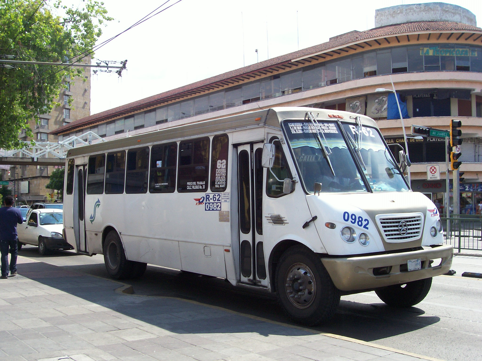 Autobus de la empresa de Transporte guadalajara, TVO (Transporte Vanguardista de Occidente A.C.)